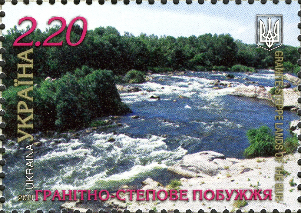 Гранітно-Степове Побужжя на марці, присвяченій проекту "Сім природніх чудес України"